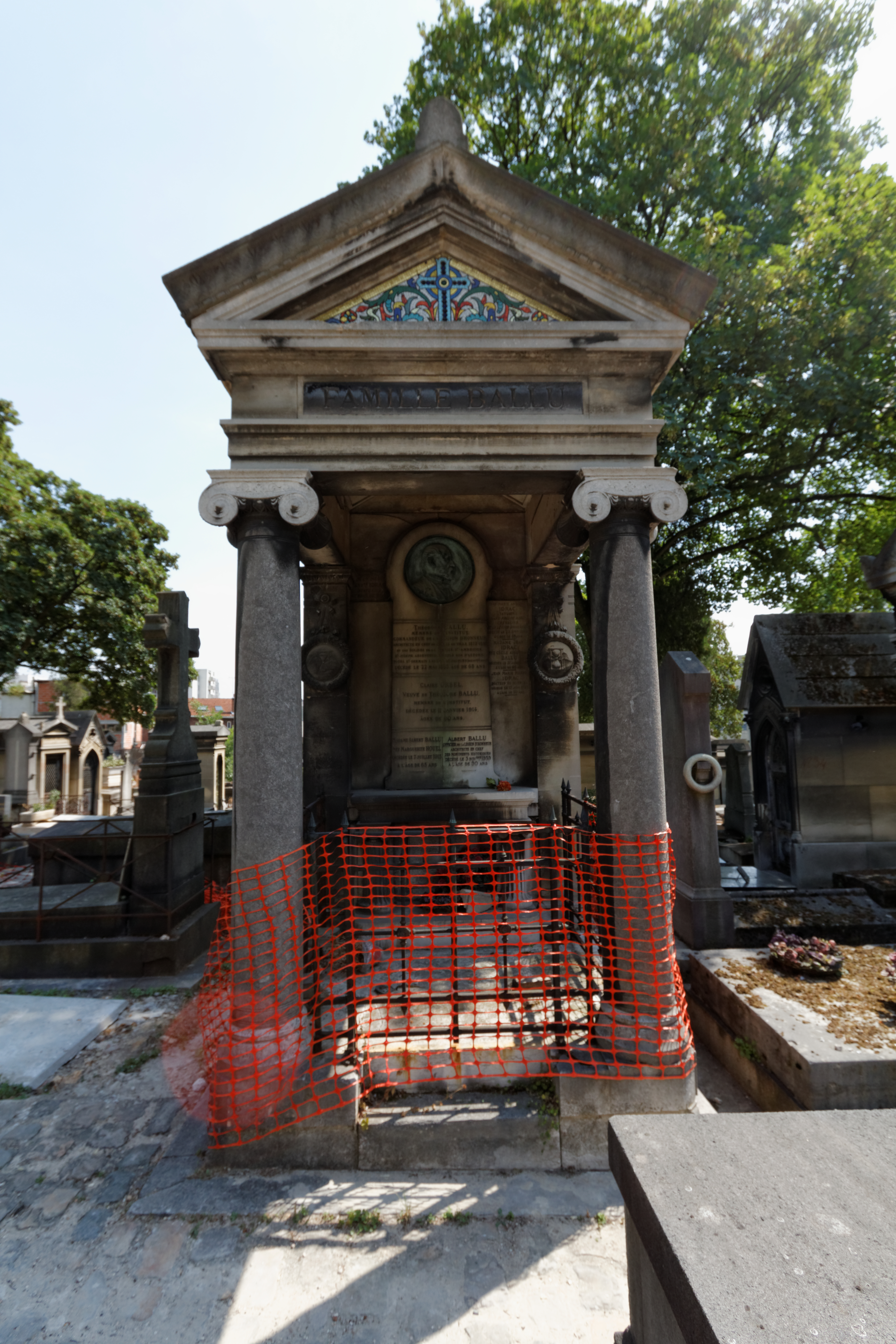 Monument orné d'un médaillon en bronze signé Daniel Dupuis.